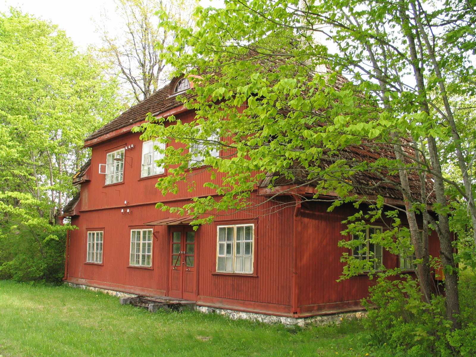 Esna jaamahoone